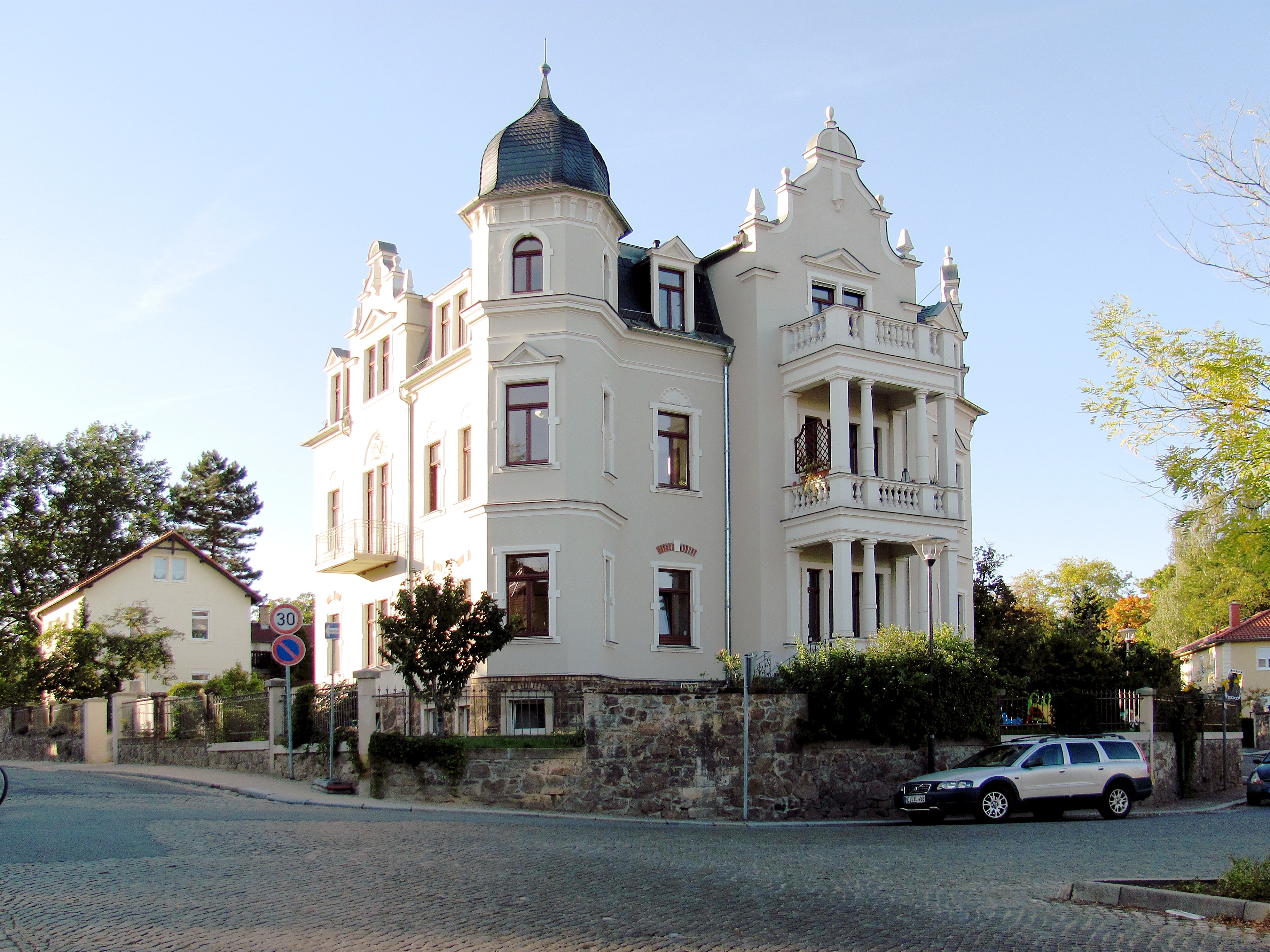 Radebeul, Mietvilla Winzerstraße 2